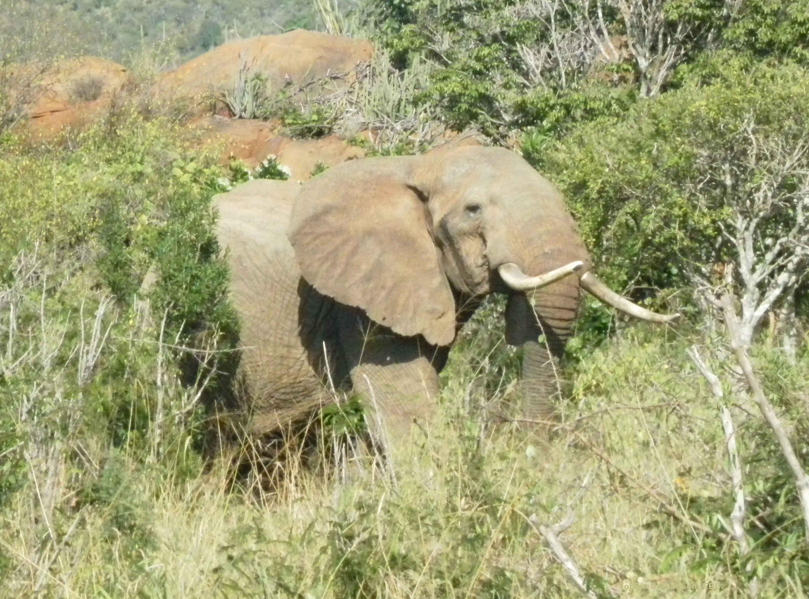 Afrikanischer Elefantenbulle in Musth. Auffällig die Schläfendrüse mit Sekretausfluss zwischen Auge und Ohr.